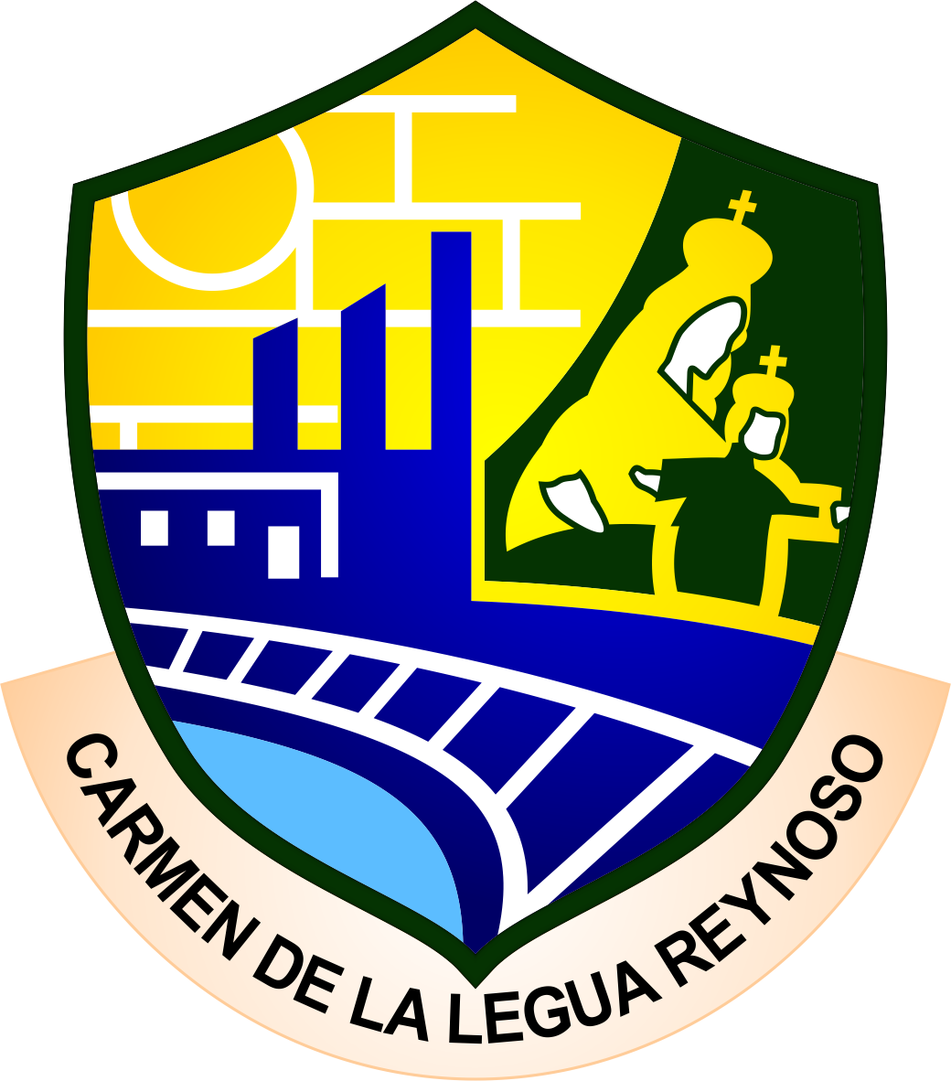 Distrito de Carmen de La Legua Reynoso - Provincia del Callao